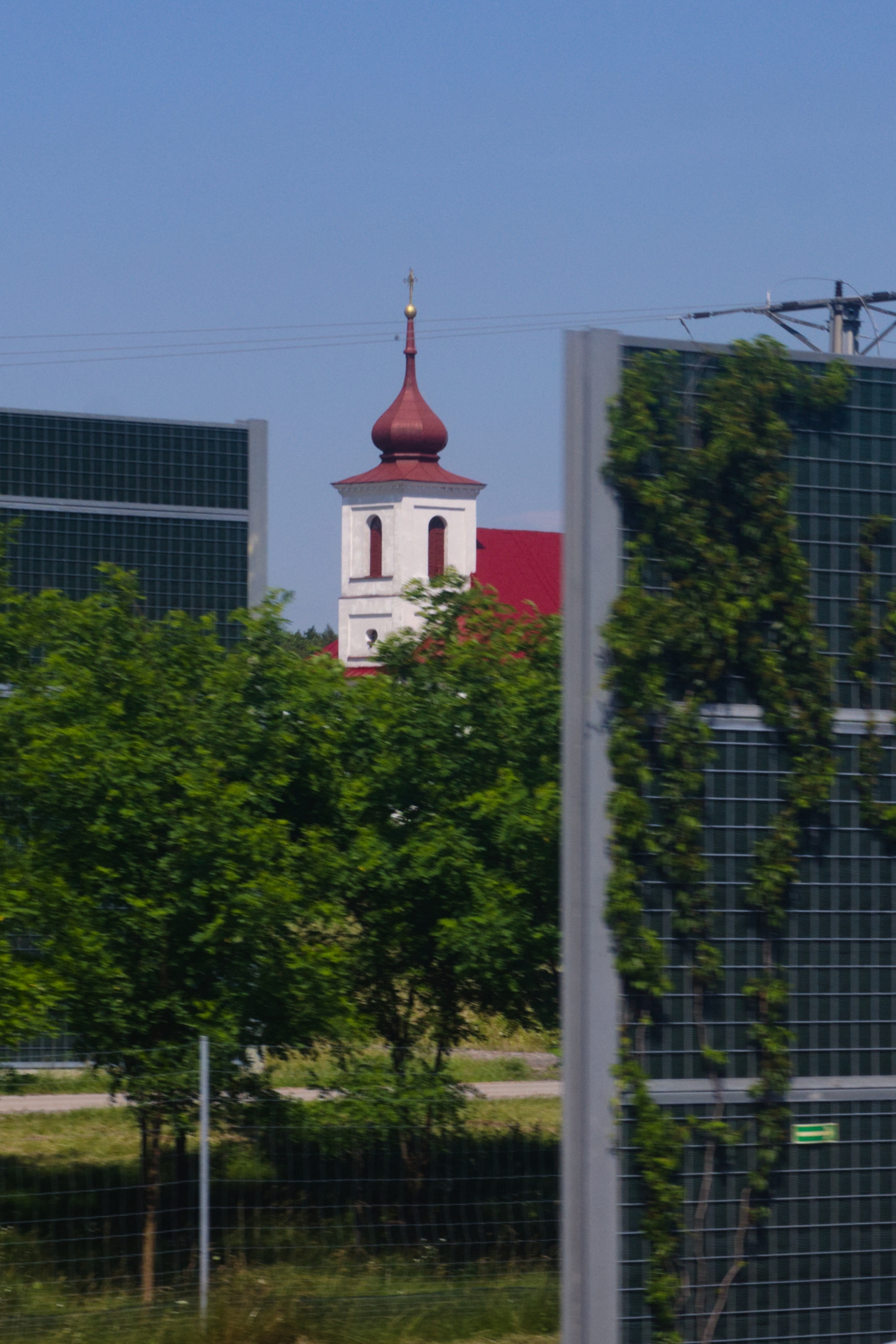 wieża kościoła św. Stanisława w Czarnej Sędziszowskiej, widok z autokaru jadącego autostradą A4